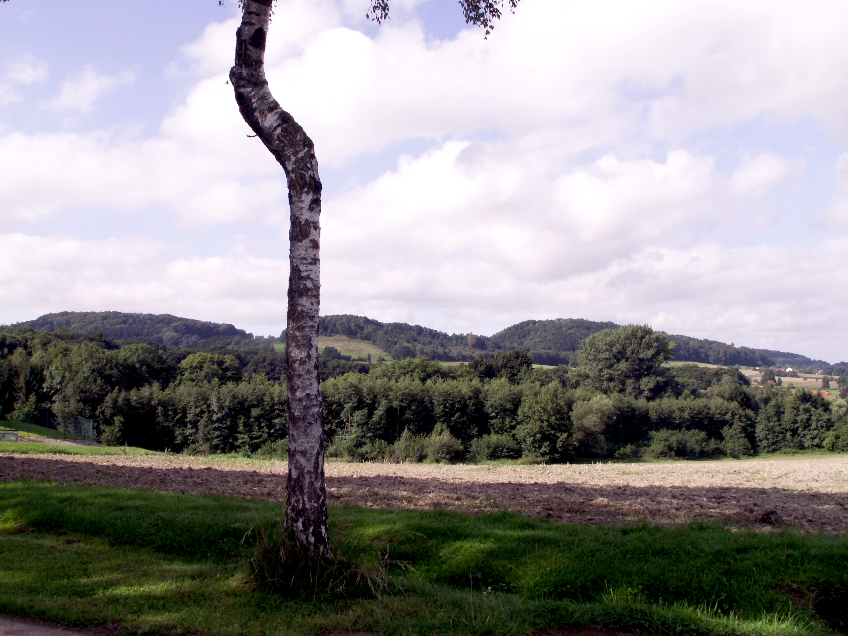 Kleiner Selberg (Bildmitte), Großer Selberg (rechts daneben); Nordostseiten in Vlotho, Kreis Herford, Nordrhein-Westfalen.